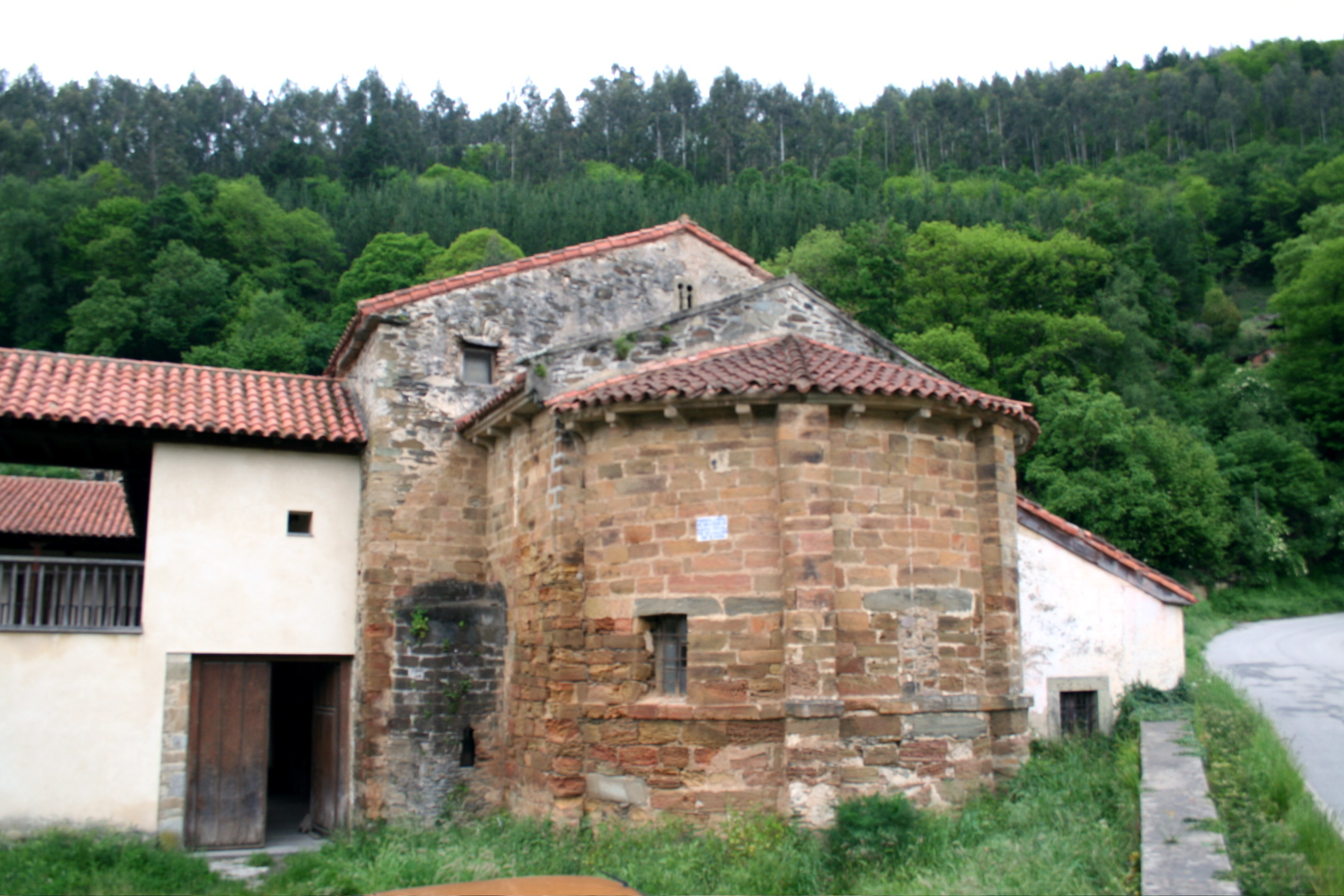 San Miguel de Bárcena